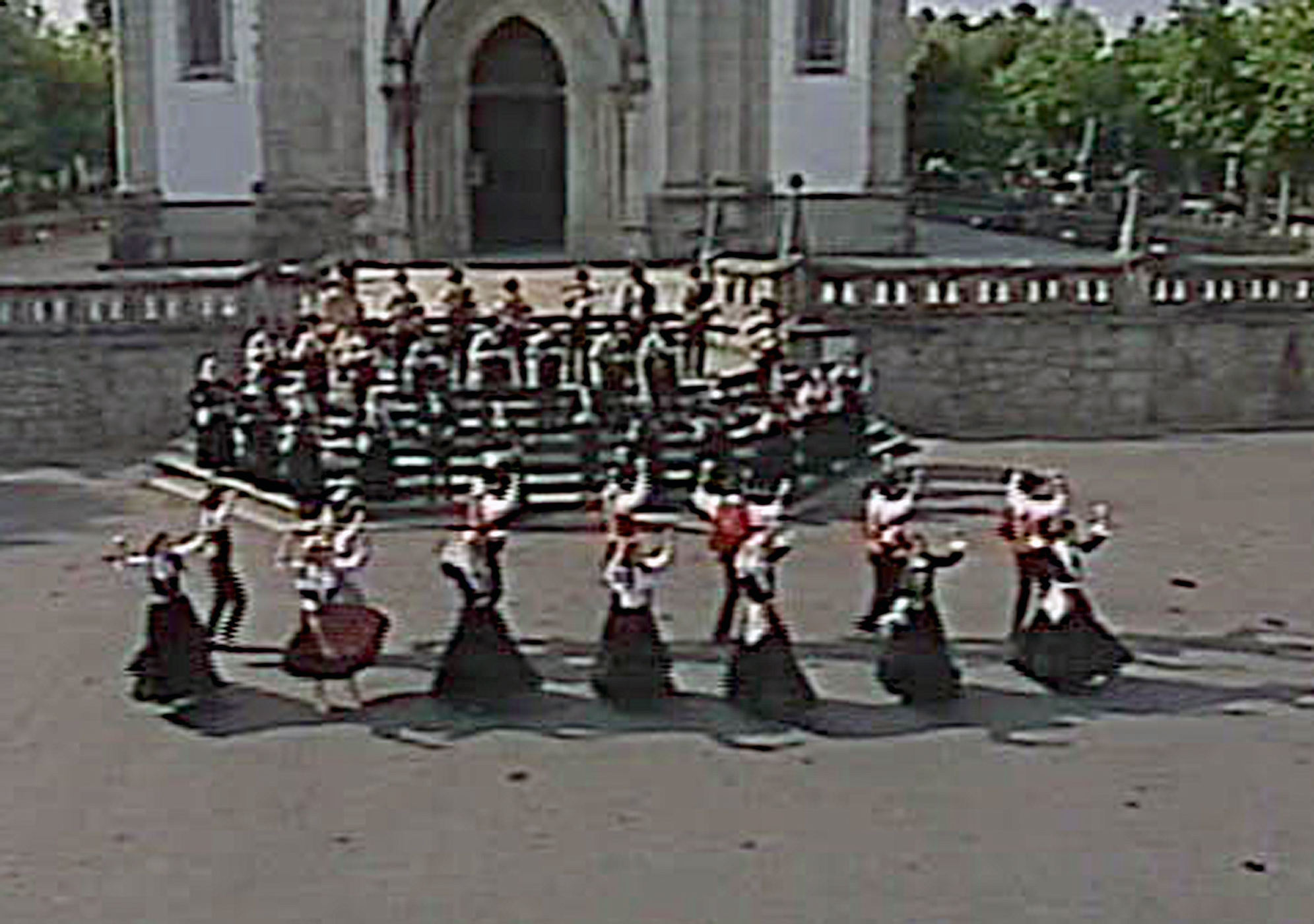 Foto da dança folclórica portuguesa o Vira do minho